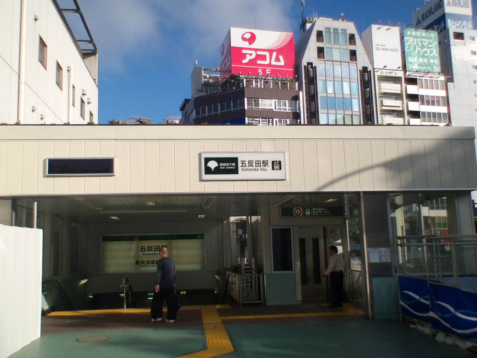 五反田駅出入口